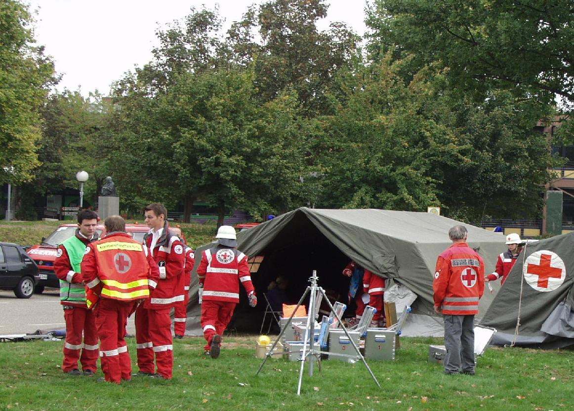 Betrieb eines Verbandsplatzes in Kirchzarten 2003 während einer Übung